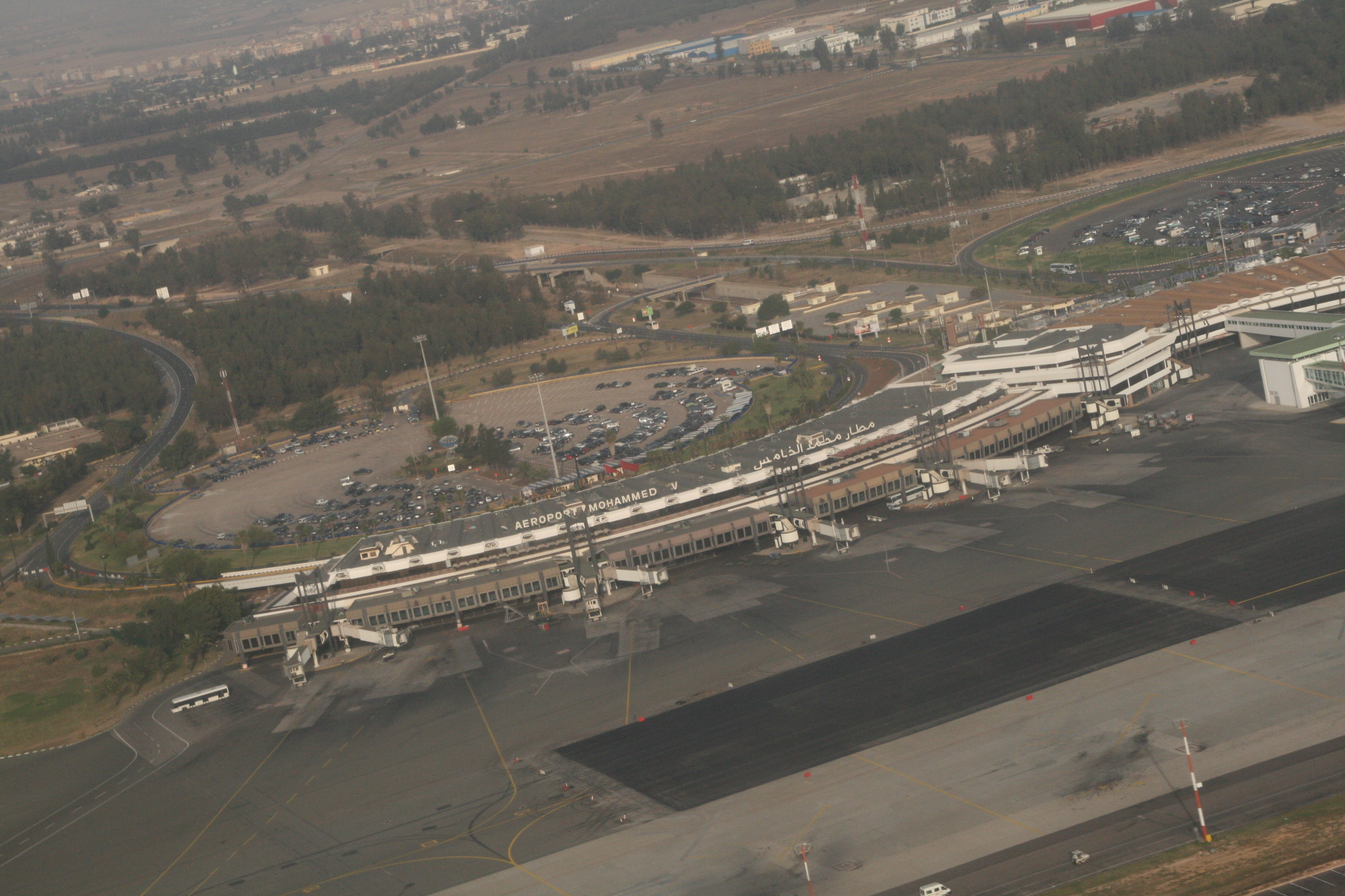 Flughafen Airport Casablanca 2008